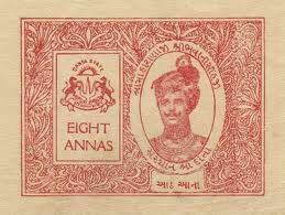 ગુજરાતી: દાંતા રાજ્યની ટપાલ ટિકિટ